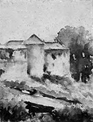 Obraz Zamku w Lesku autorstwa ks. Władysława Luteckiego.